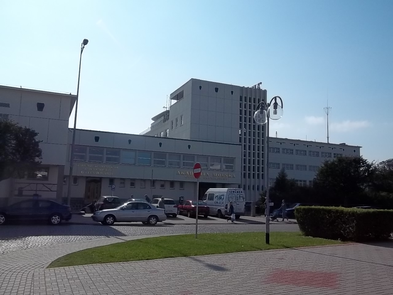 Gdynia, Aleja Jana Pawła II 3 - Dom Żeglarza Polskiego, obecnie wydział nawigacyjny Uniwersytetu Morskiego w Gdyni, 1937